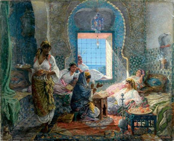 La cartomancienne au harem.title QS:P1476,fr:"La cartomancienne au harem." label QS:Lfr,"La cartomancienne au harem."